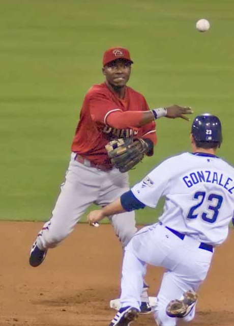 Orlando Hudson